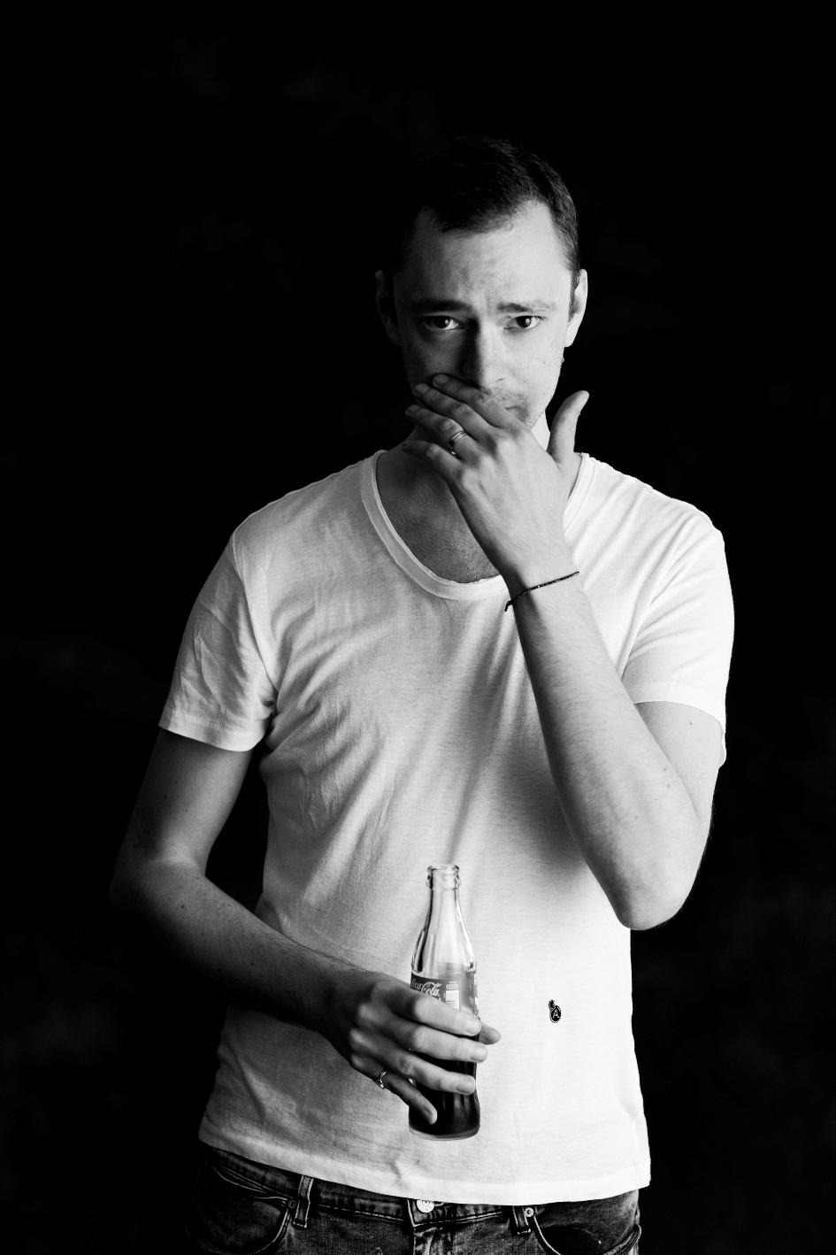 Ole Yde